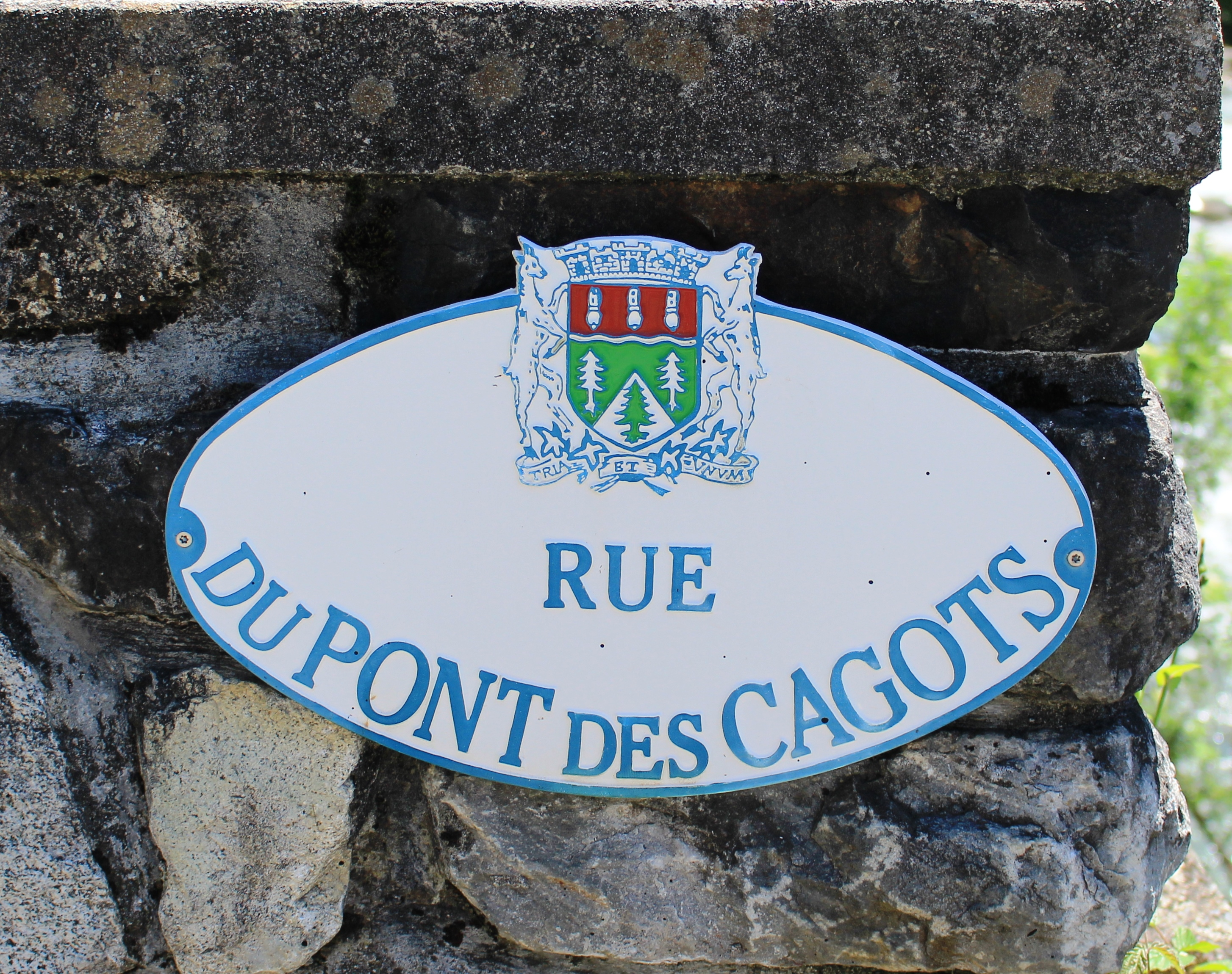 Rue du village de Campan (Hautes-Pyrénées)